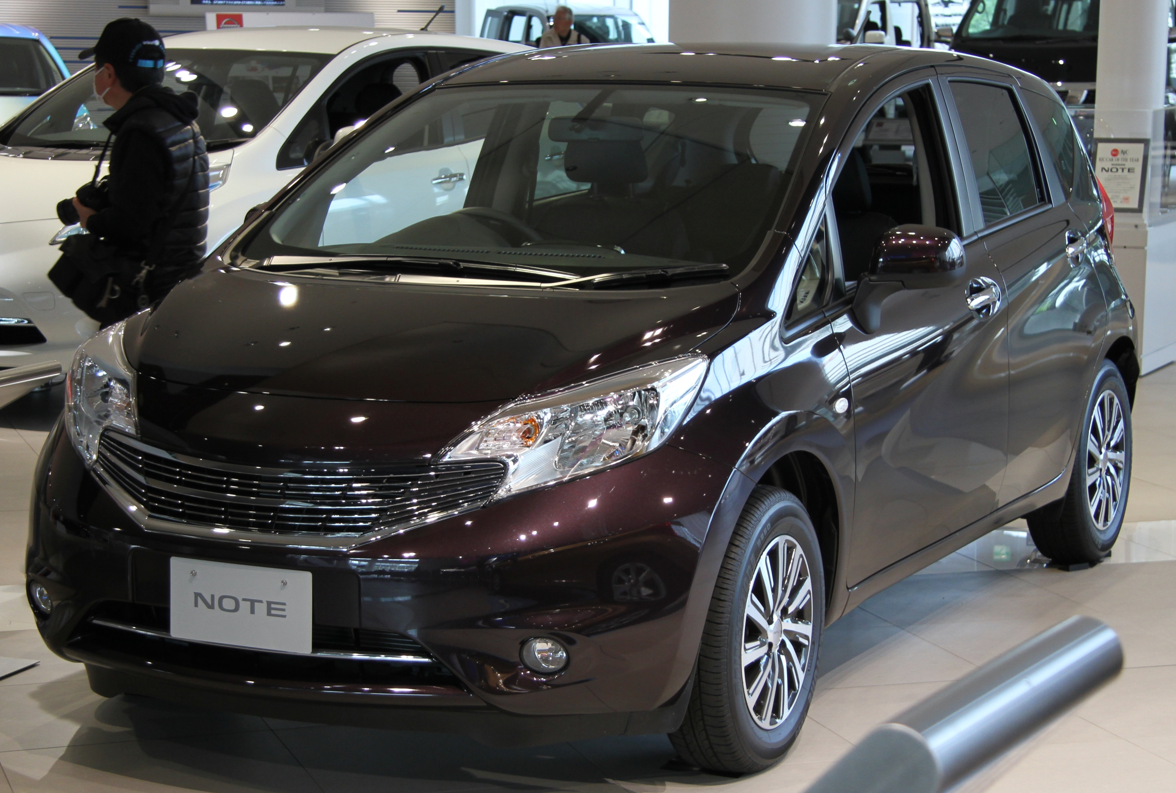 Nissan Note